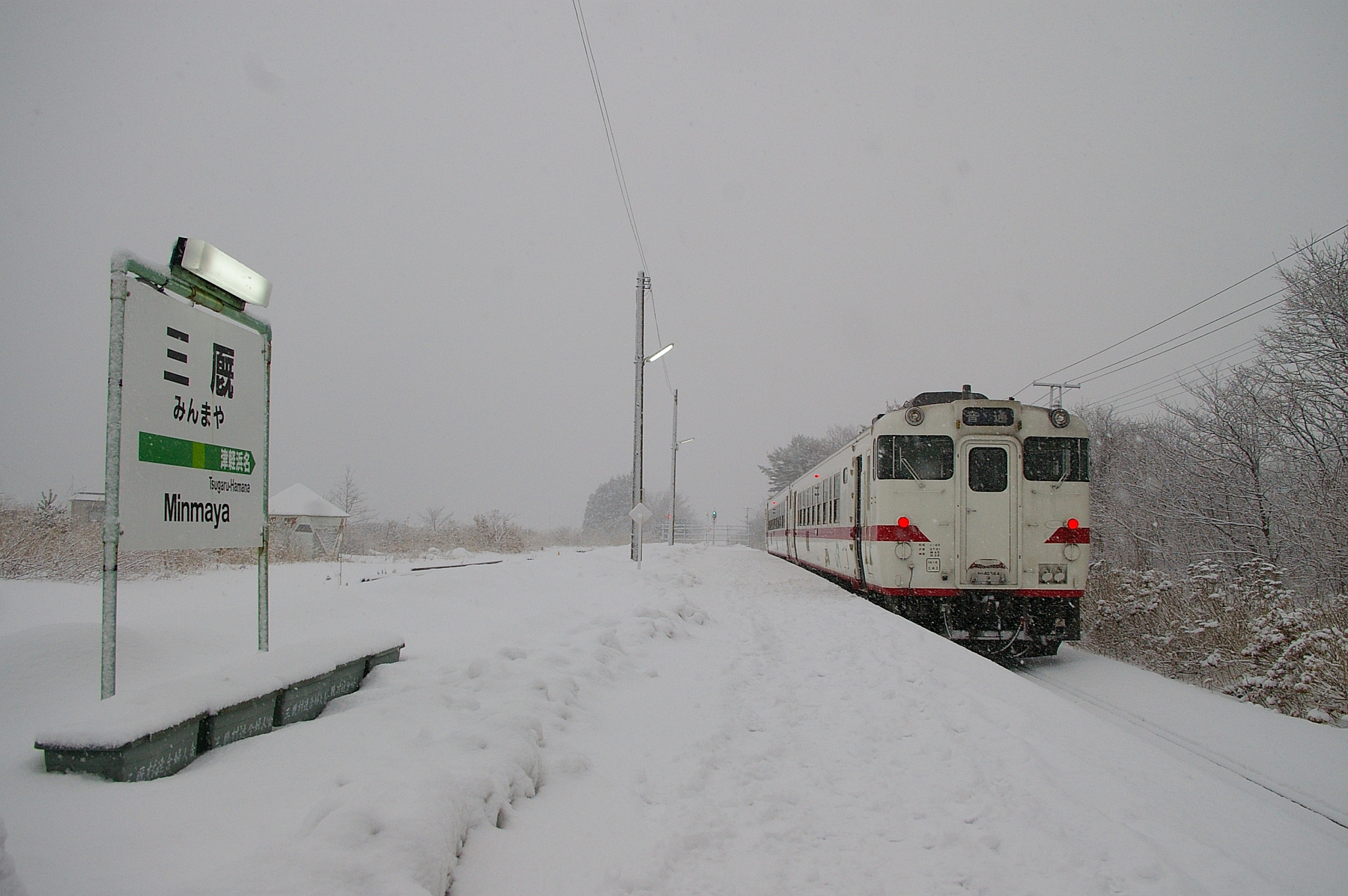 Minmaya sta. (Aomori pref) -- JR-EAST Tsugaru Line